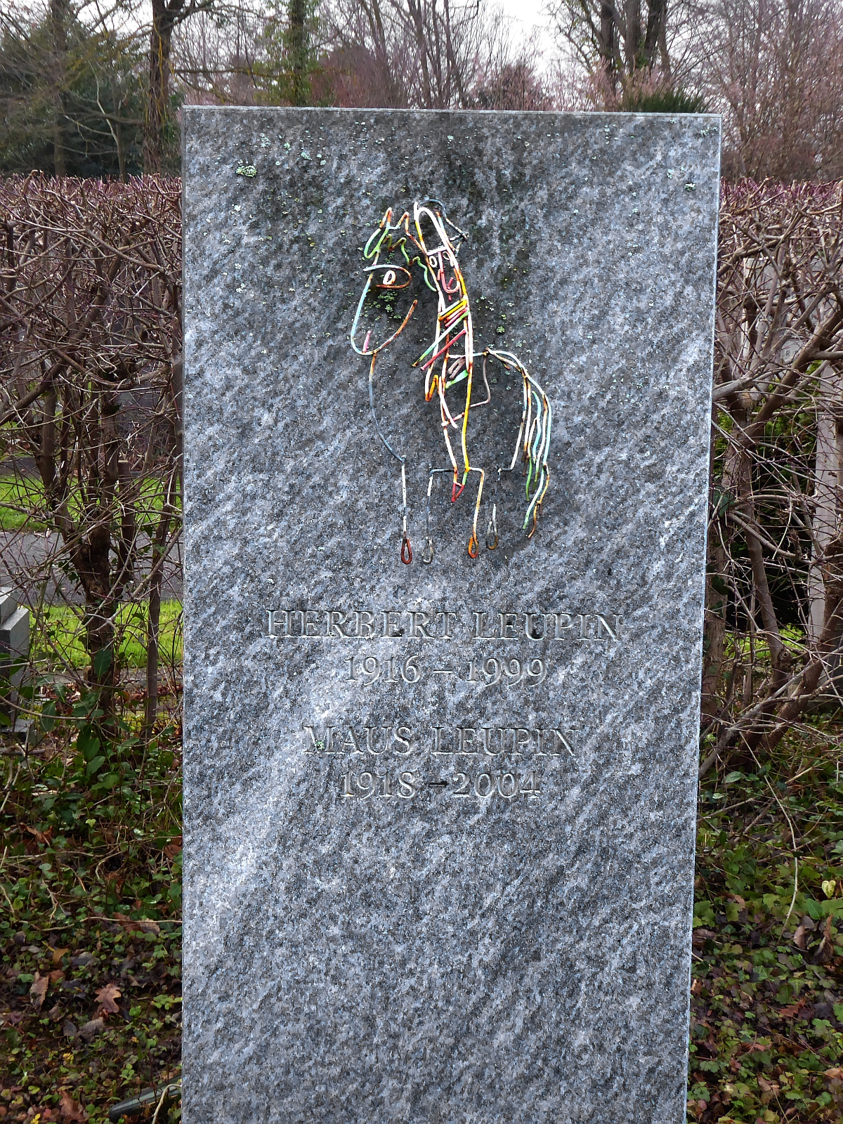 Herbert Leupin (1916–1999) Grafiker, Grafikdesigner, Plakat Gestalter, Maler und Zeichner, Grab auf dem Friedhof Hörnli, Riehen, Basel-Stadt